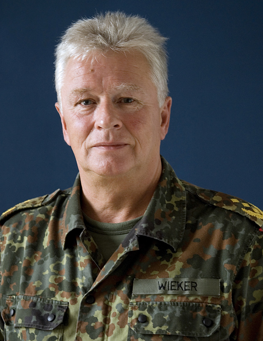 Portrait von Volker Wieker